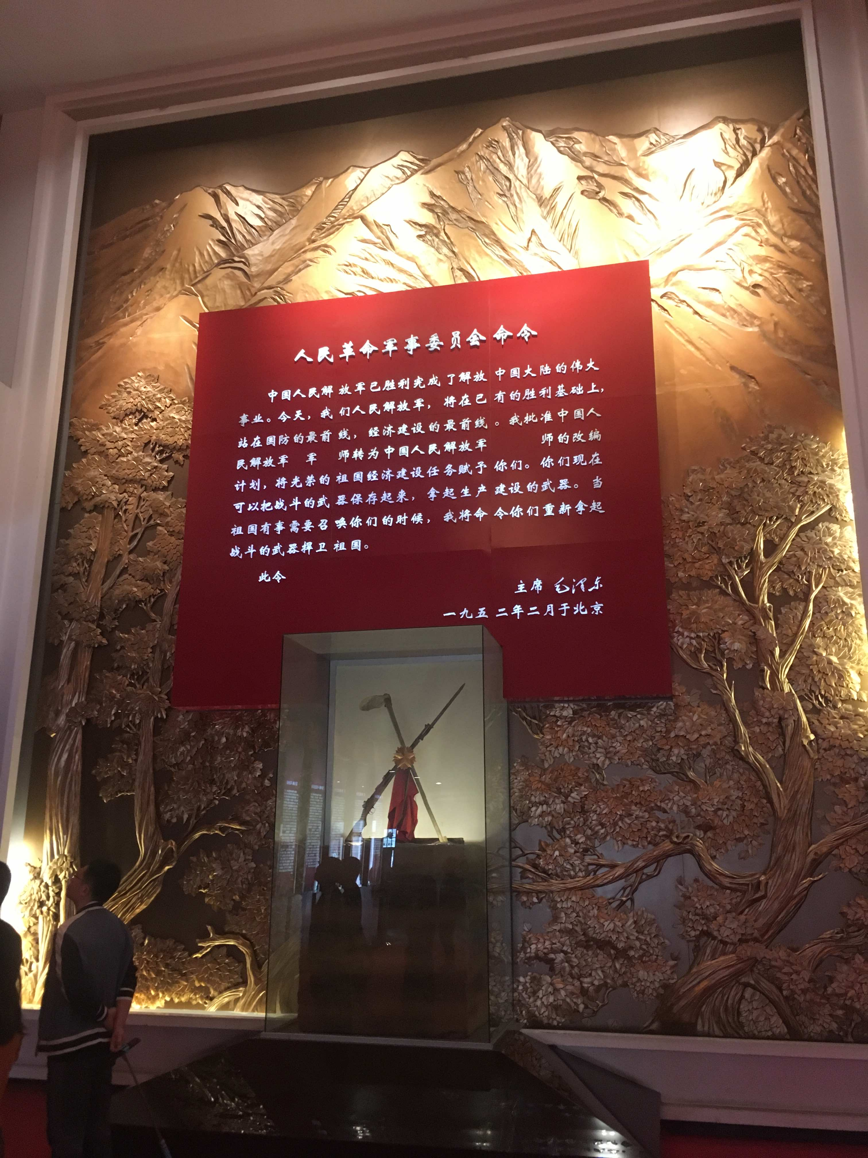 新疆兵团军垦博物馆“铸剑为犁”展区